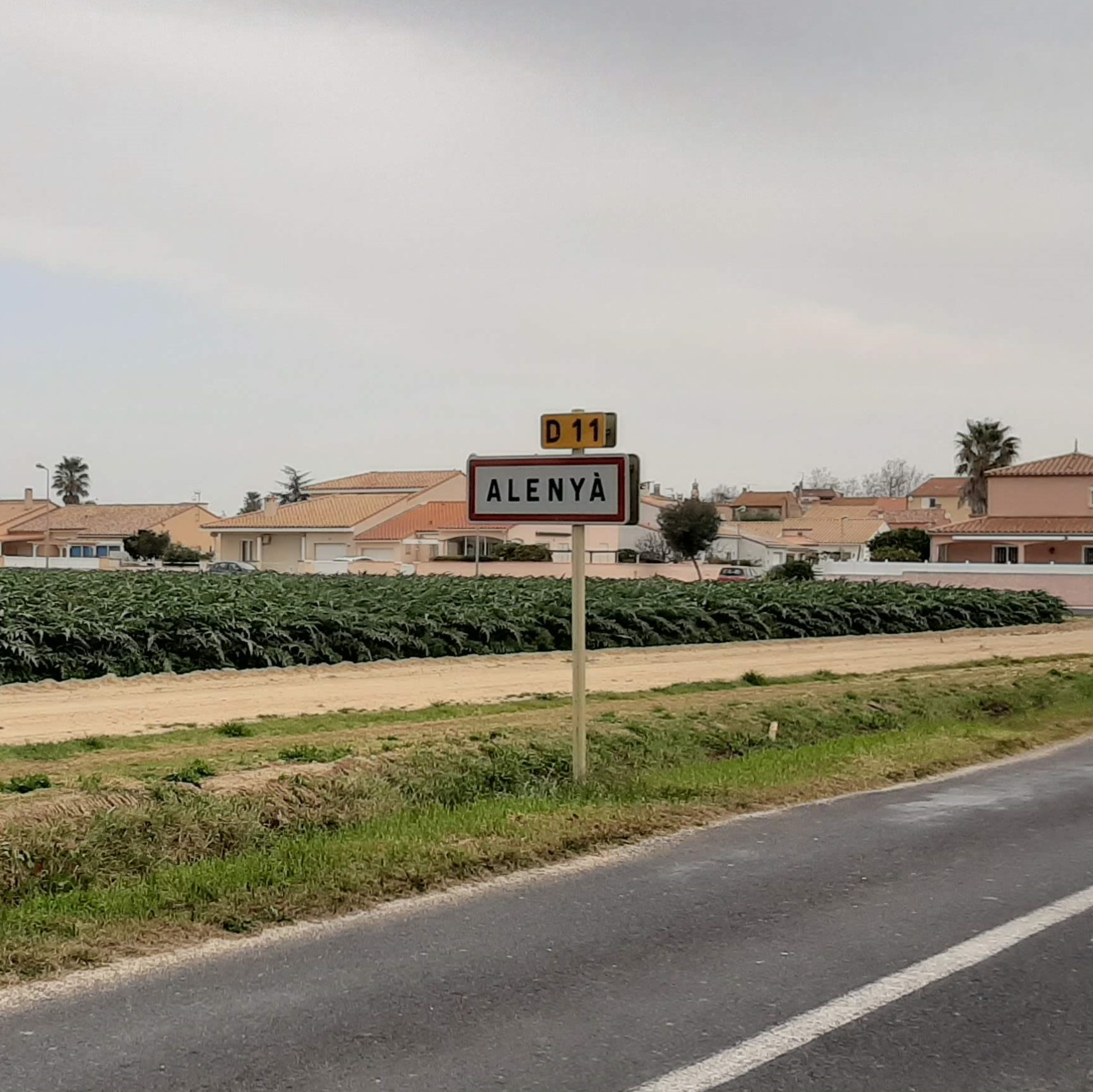 Rètol a l'entrada d'Alenyà amb el nom del municipi.